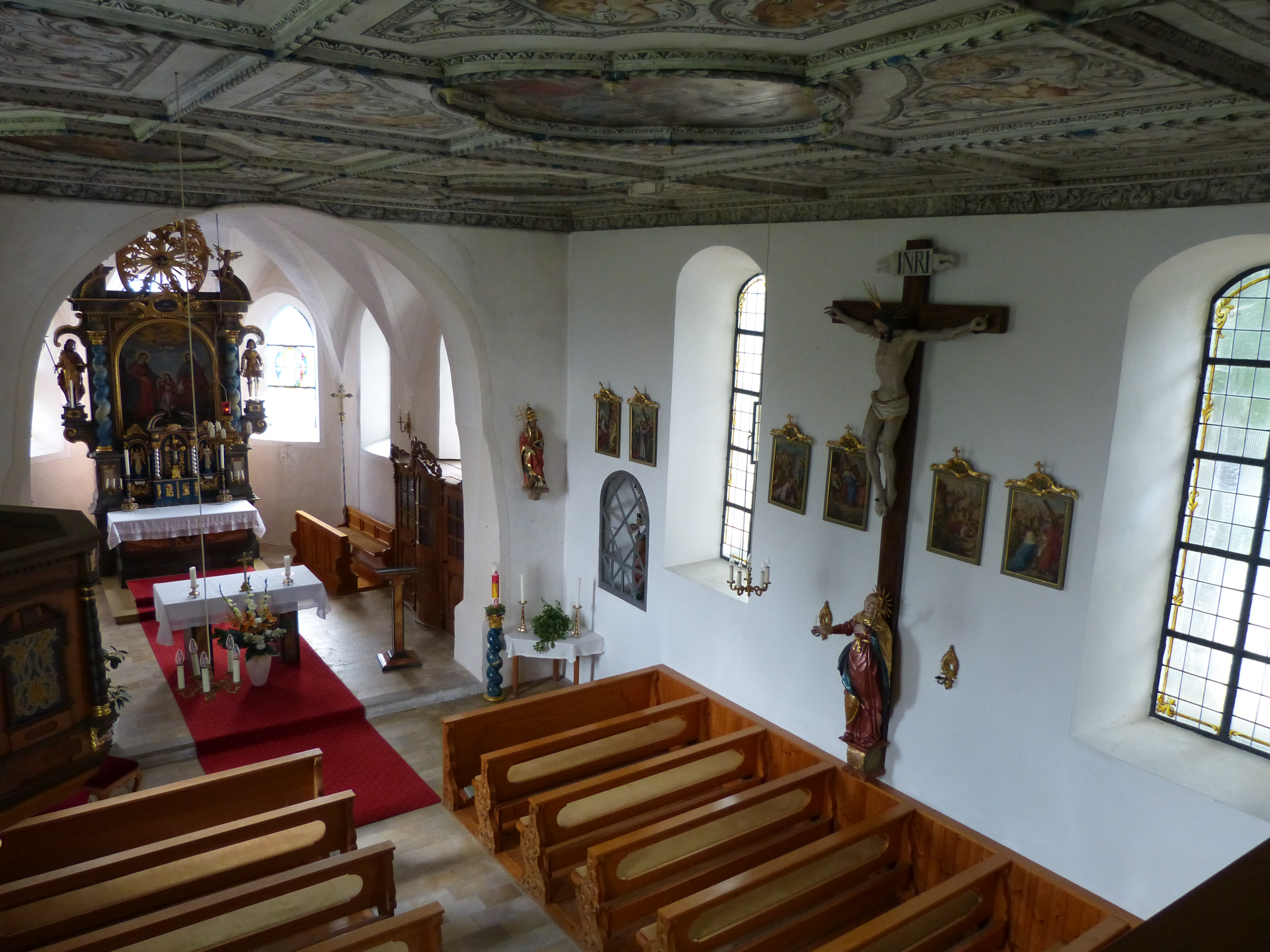 St. Johannes der Täufer in Überbach, Landkreis Oberallgäu, Bayern